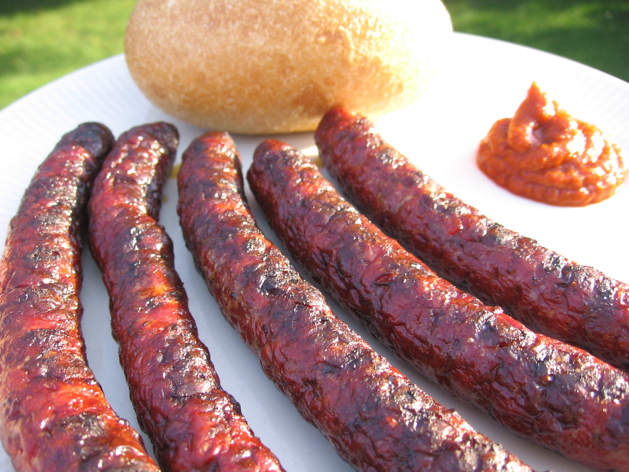 Merguez Wurst vom Grill